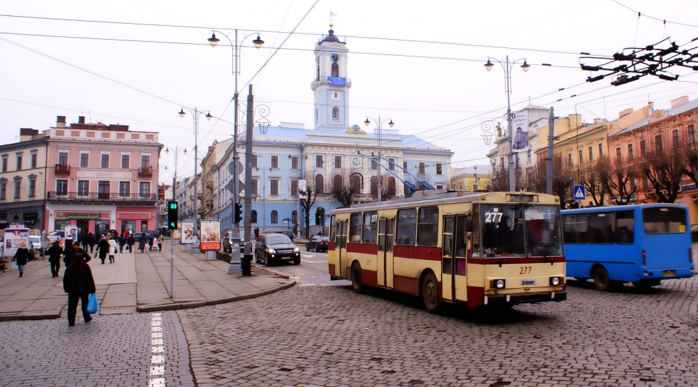 Škoda 14Tr №277: Чернівці, Škoda 14Tr №277 на Центральній площі.